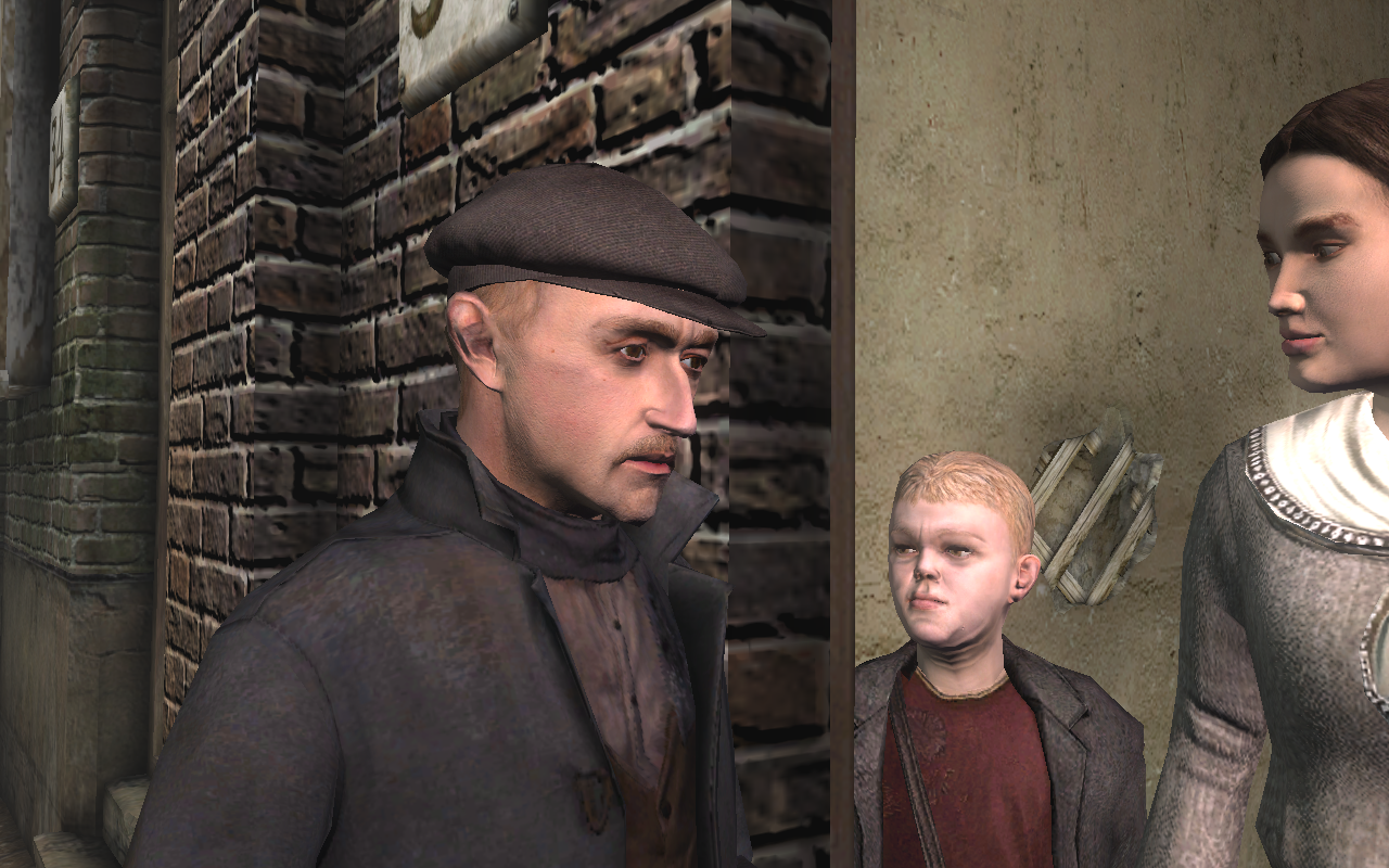 Capture d'écran du jeu Sherlock Holmes contre Jack l'Éventreur. L'homme que l'on voit est Jacob Lévy. Holmes fini par montrer que c'est cet homme qui est le meurtrier que l'on désigne sous le nom de Jack l'Éventreur. On aperçoit aussi sur l'image le fils de J. Lévy, dont le visage porte les marques de la syphilis, ce qui a été un indice crucial dans l'enquête.